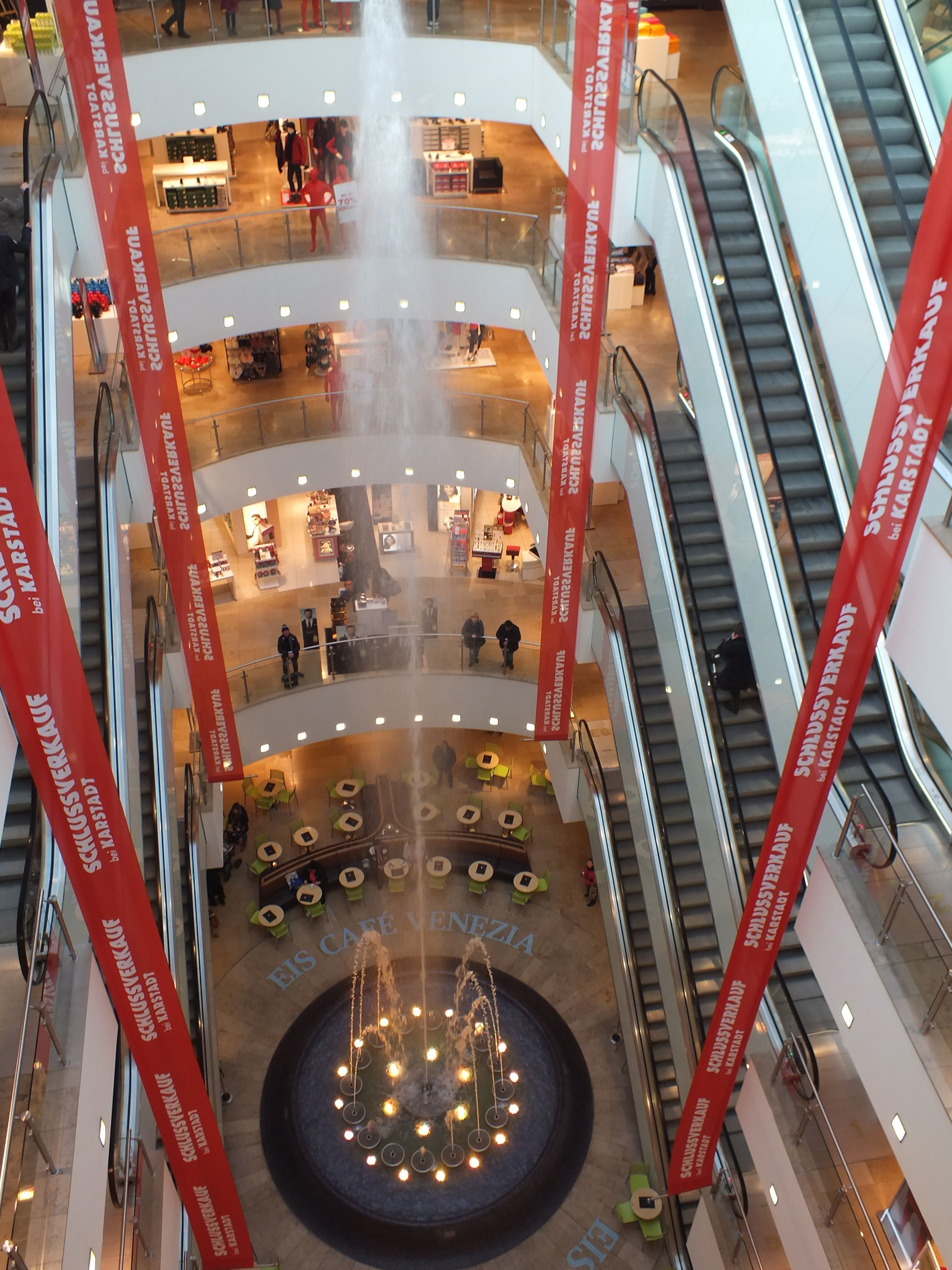 Die stündliche Fontäne über fünf Etagen im Lichthof des Kaufhauses Karstadt in Leipzig